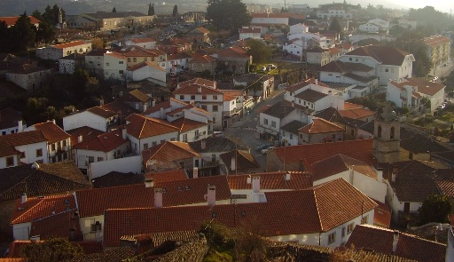 Imagem geral de Celorico - Foto tirada do Castelo a 501m de altitude